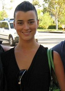 Cote de Pablo cropped image